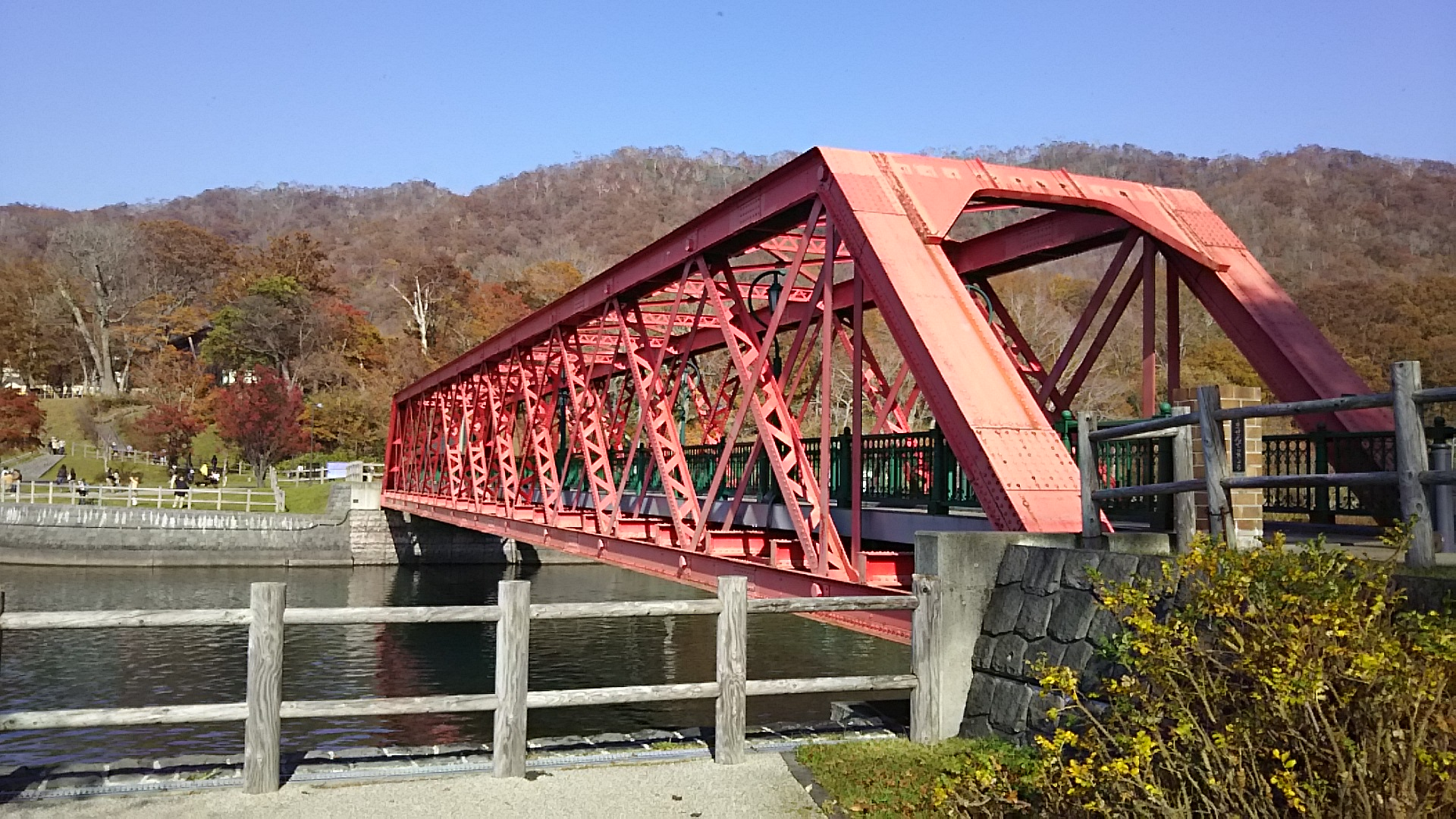 王子軽便鉄道で使用されていた通称「山線鉄橋」。北海道千歳市支笏湖温泉の遊歩道橋として現存。2015年10月17日撮影。